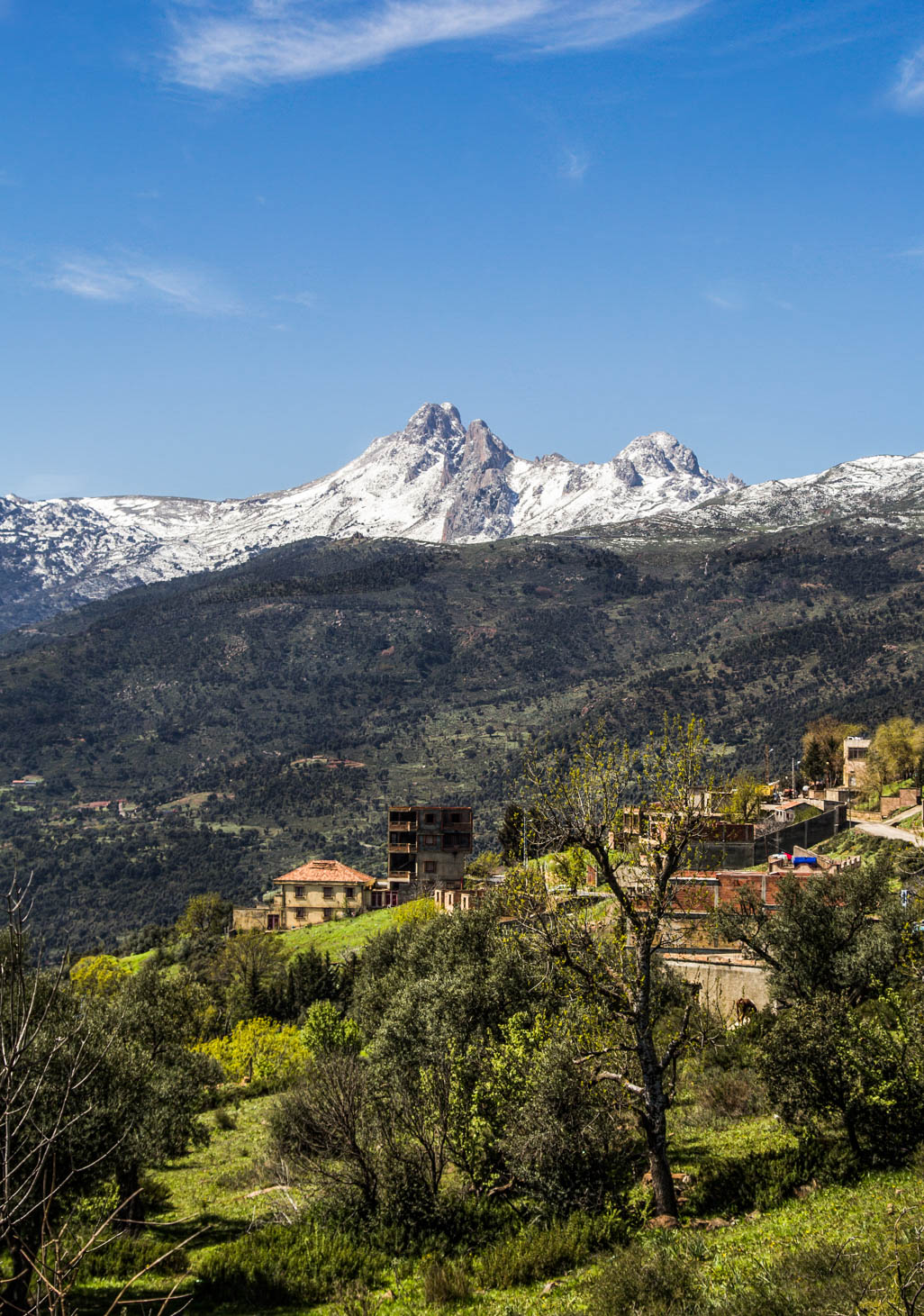 prise à Béjaia (Algérie)